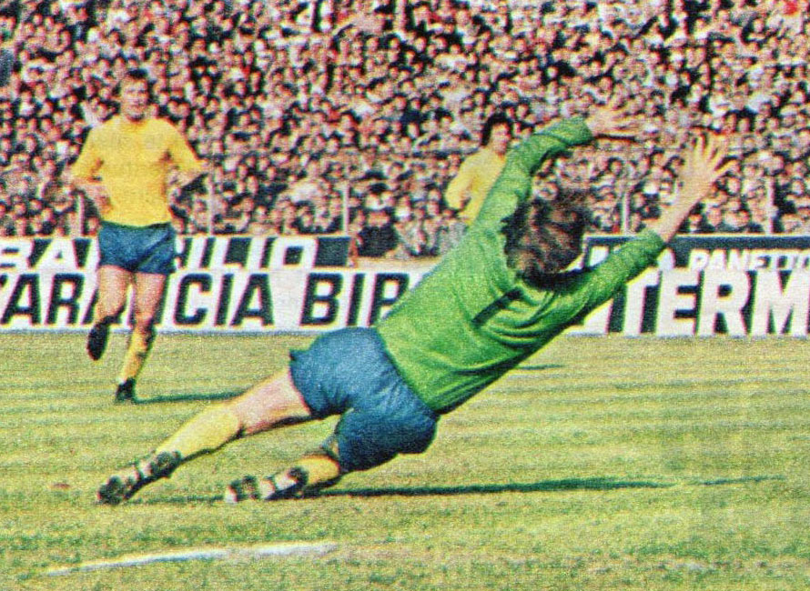 Torino, stadio Comunale, 11 aprile 1973. Il portiere dei Rams Colin Boulton in azione nel corso della sfida tra Juventus e Derby County (3-1) valevole per la semifinale di andata della Coppa dei Campioni 1972-73.